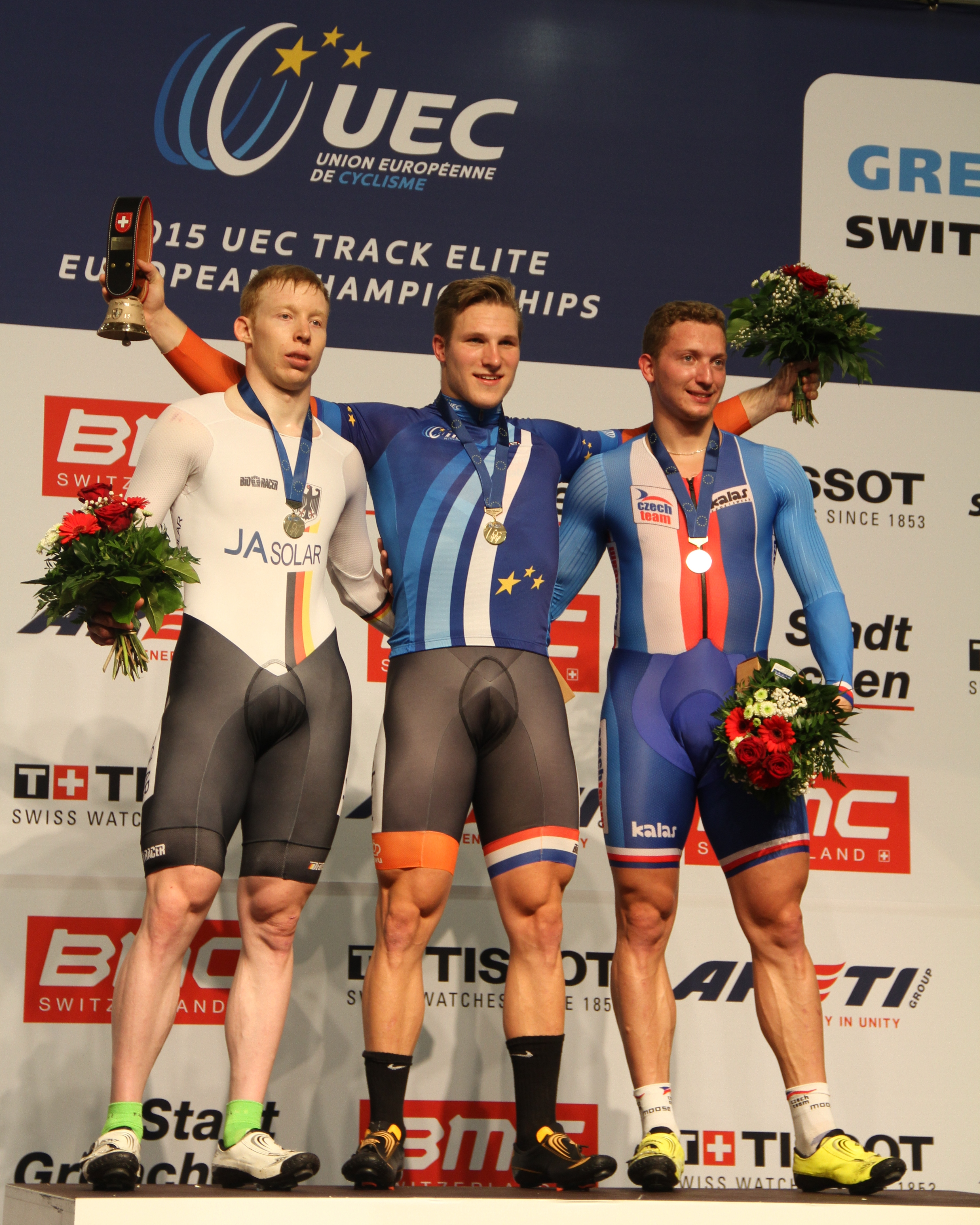 Podium 1000-Meter-Zeitfahren (v.l.n.r.): Joachim Eilers, Jeffrey Hoogland, Robin Wagner The making of this document was supported by the Community-Budget of Wikimedia Germany.